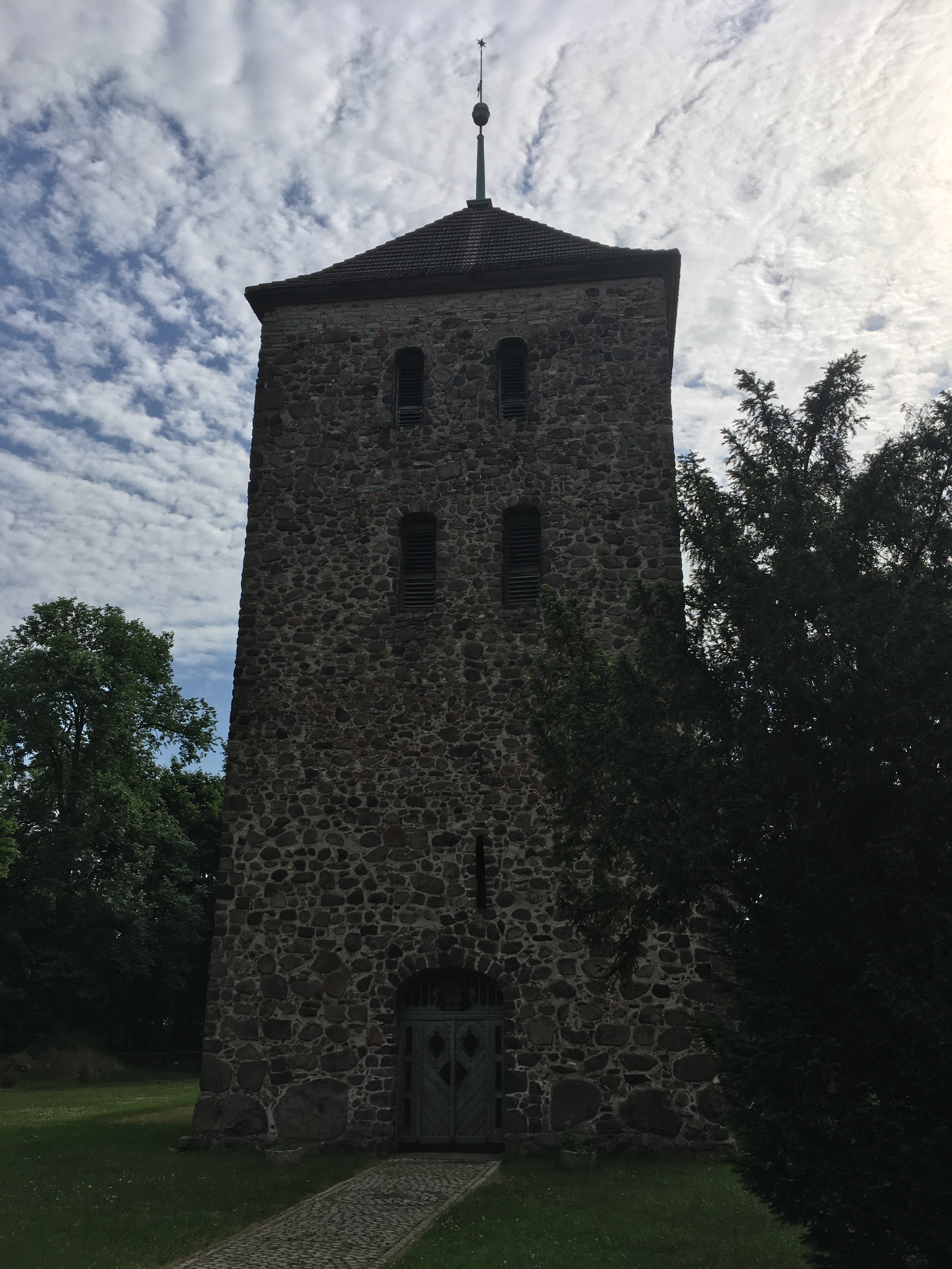 Die Hoffnungskirche in Rüdersdorf bei Berlin ist eine Feldsteinkirche aus dem 13. Jahrhundert, die 1718 und 1790 nach Osten hin erweitert wurde.